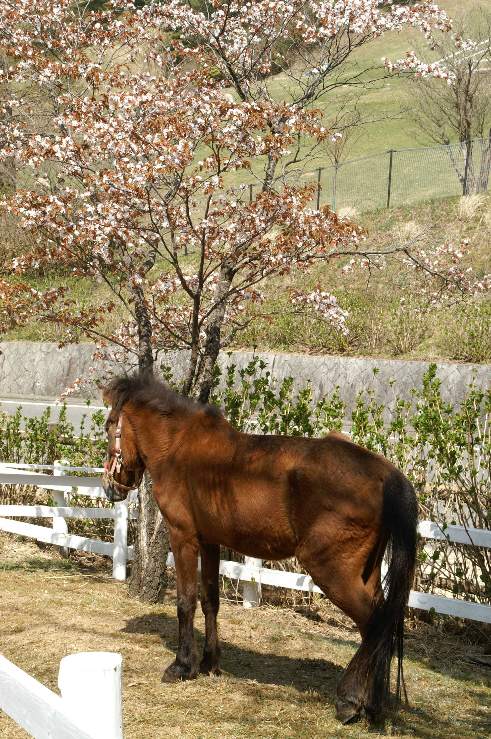 与那国馬。 (2009/04/19 Kobe, Hyogo, JAPAN)